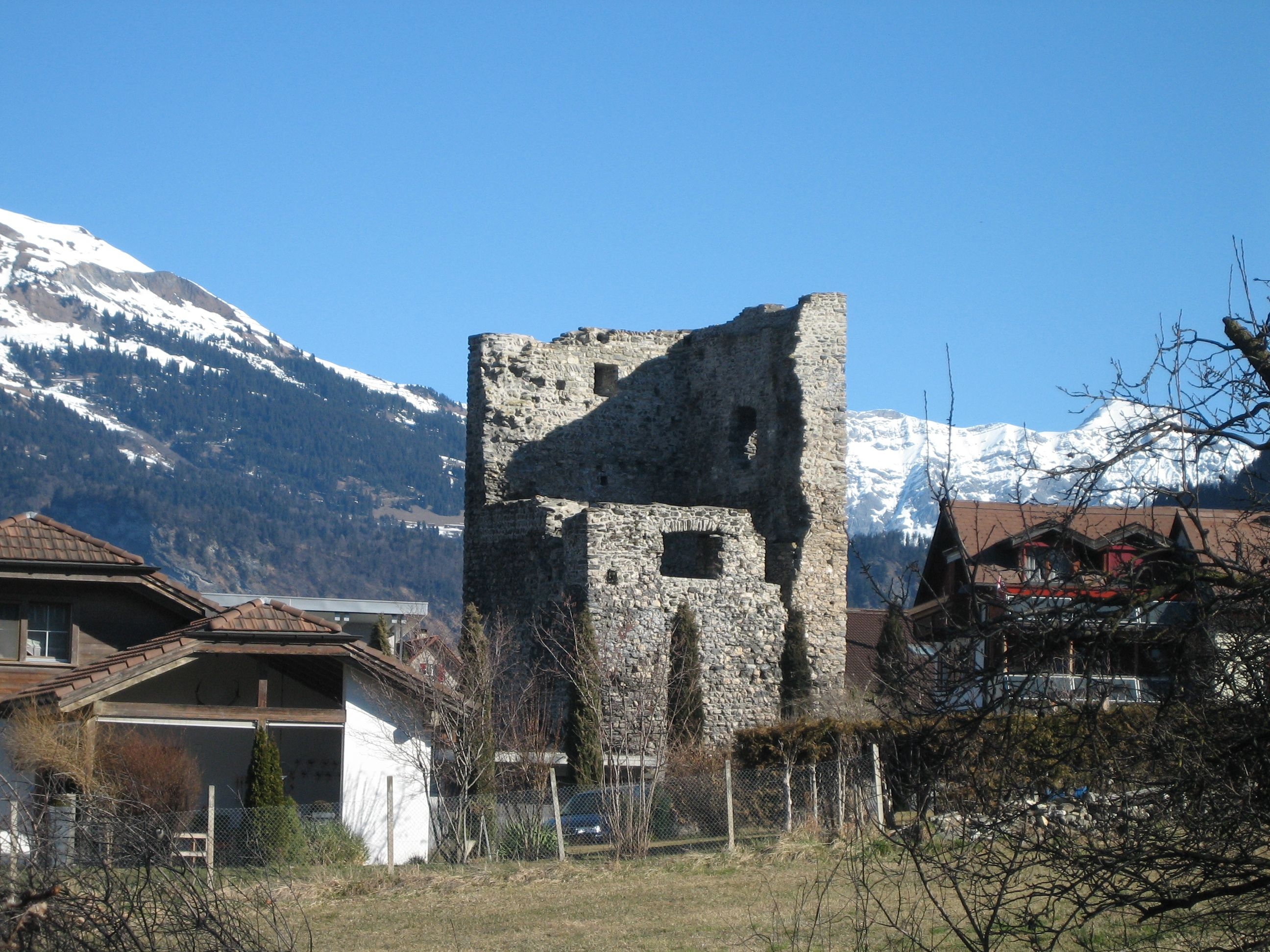 Ruine Friedau in Zizers